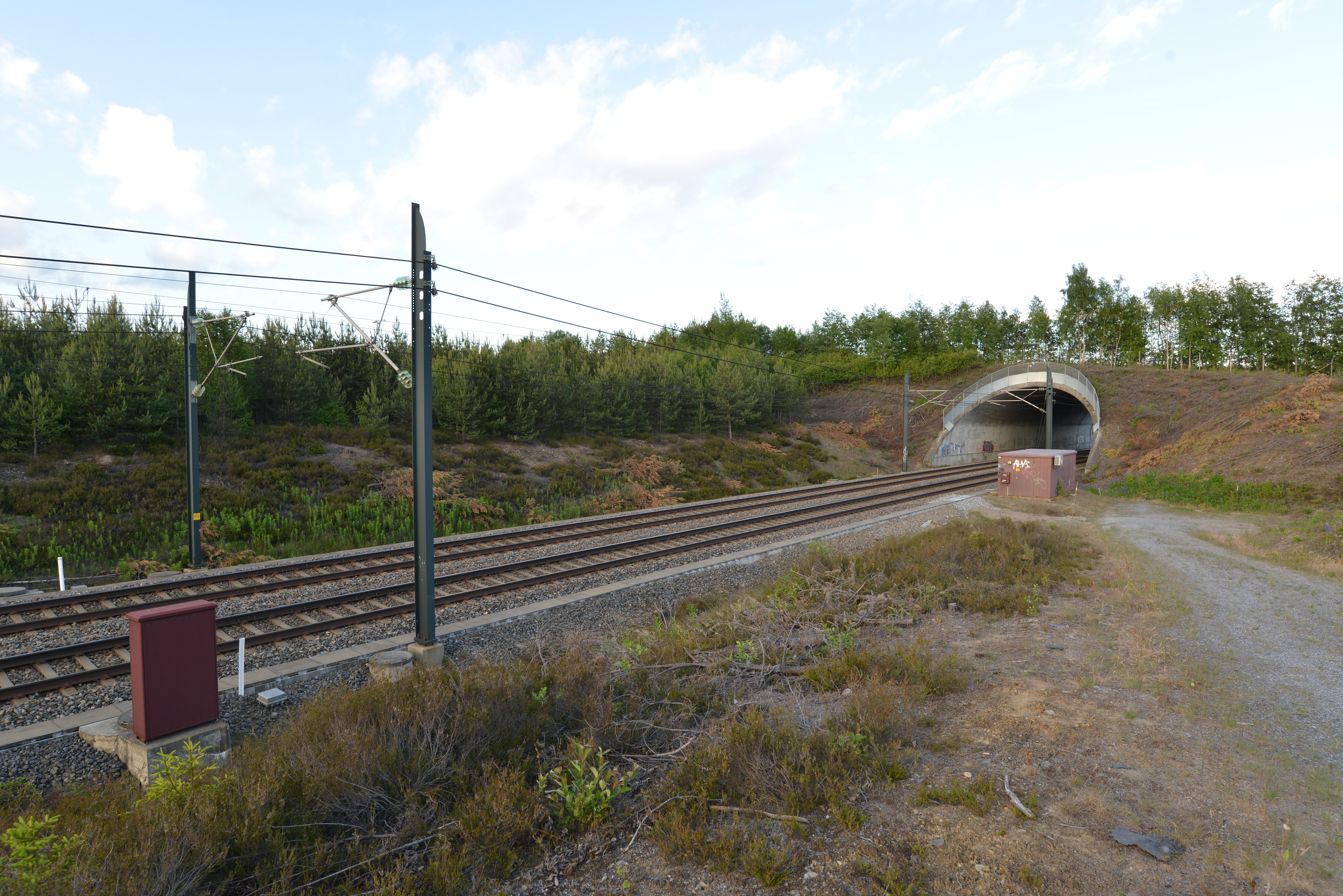 Gardermobanen går parallelt med E16 ved Fursmotunnelen